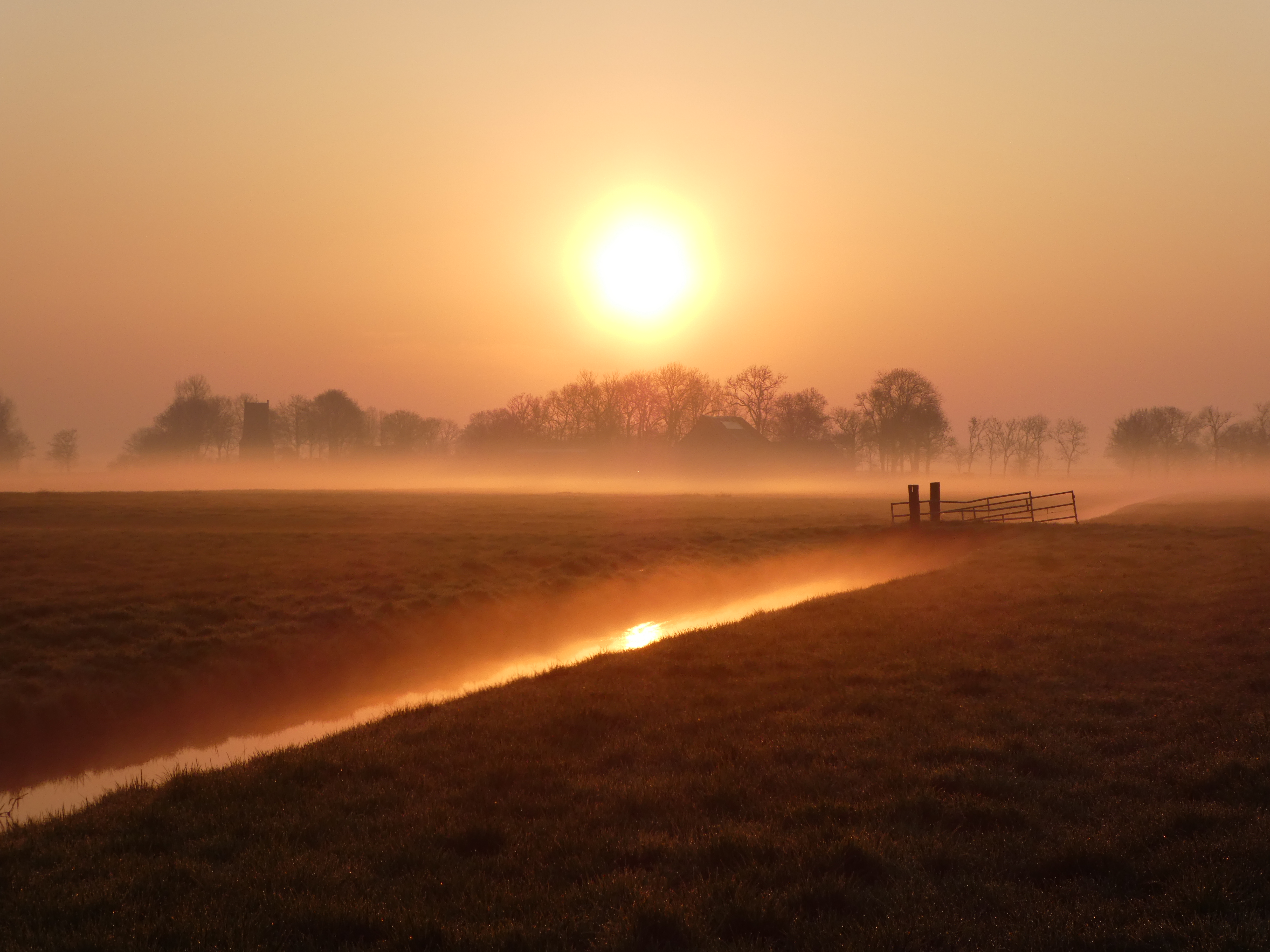 Titelbild der Fotoausstellung "Zauberhafte Groninger Landschaft"